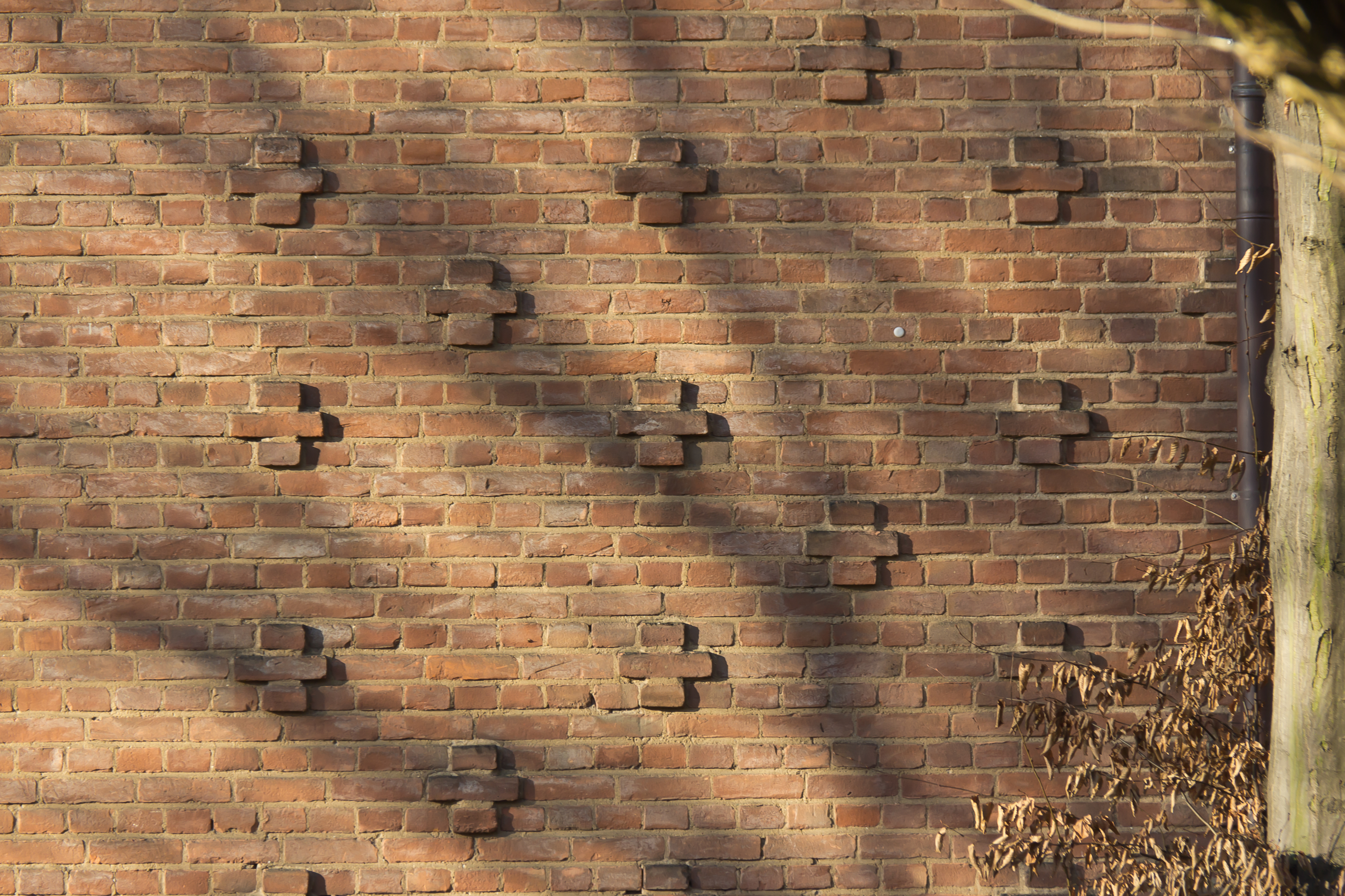 Denkmalgeschützte Kirche St. Joseph in Köln-Braunsfeld. Architekten: Rudolf Schwarz und Josef Bernard, Bauzeit: 1952-55.